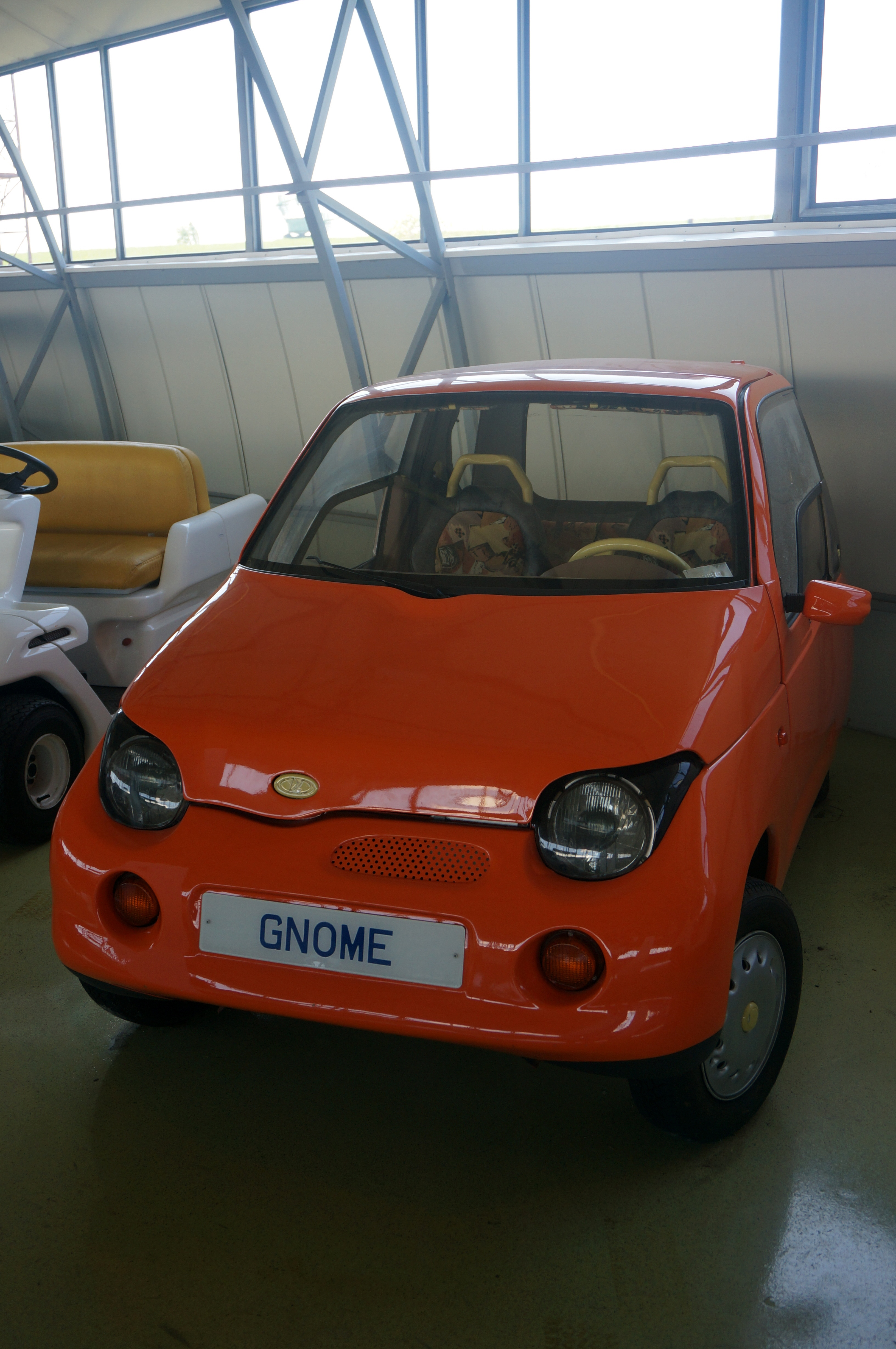 ВАЗ 1151 "Гном"